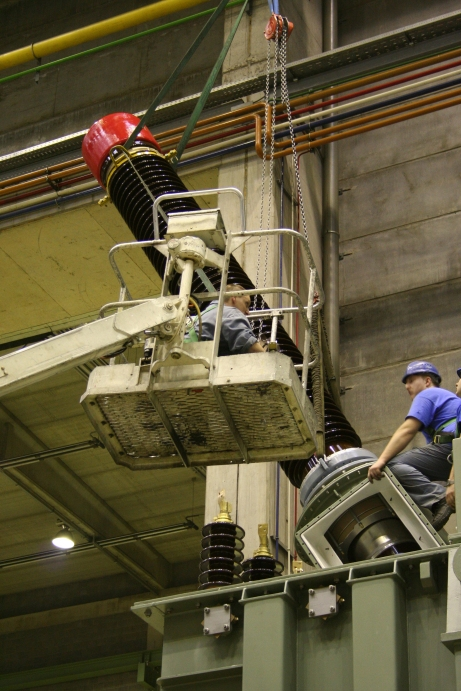 De montage van een 400kV doorvoering op een vermogentransformator